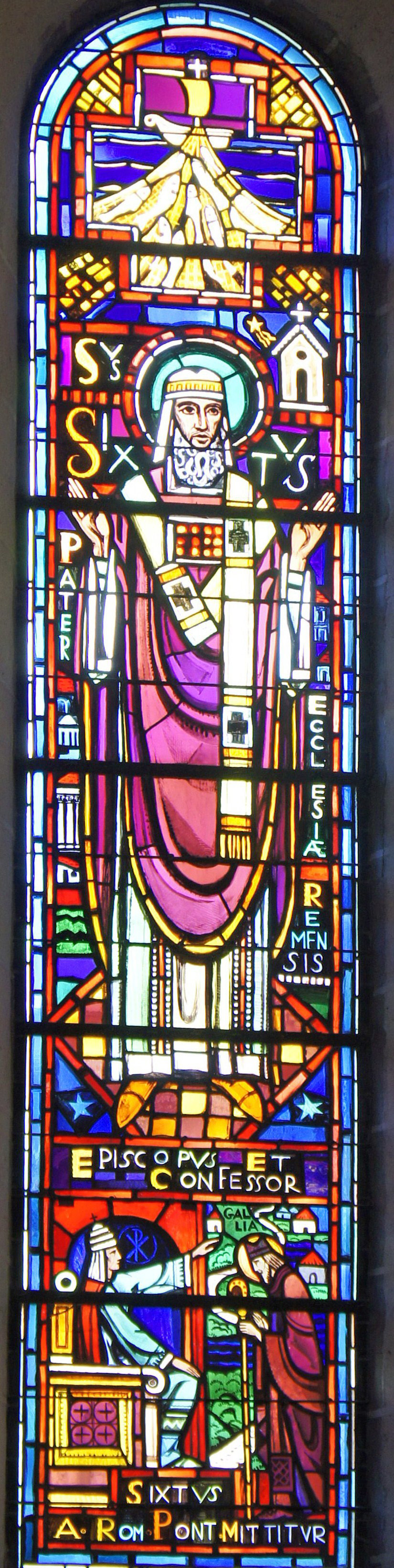 couvent Saint-Sixte ancien séminaire de Reims. Vitrail de Sixte de Reims.